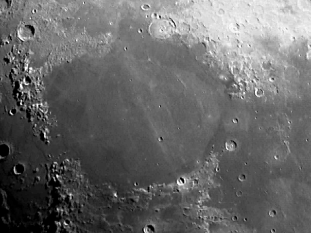 Mond - Mare Serenitatis